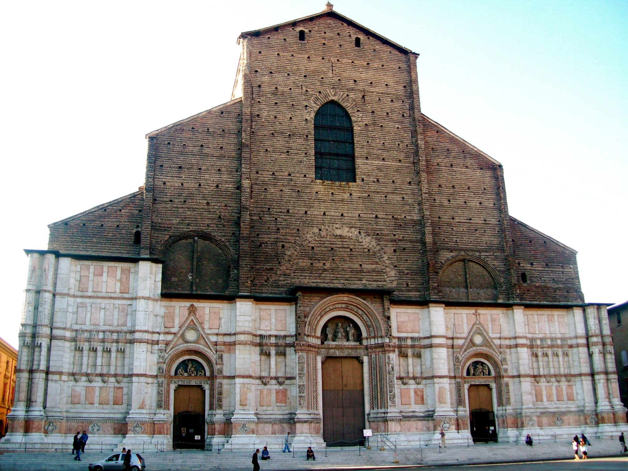 Basilica San Petronio - MIBAC This is a photo of a monument which is part of cultural heritage of Italy.